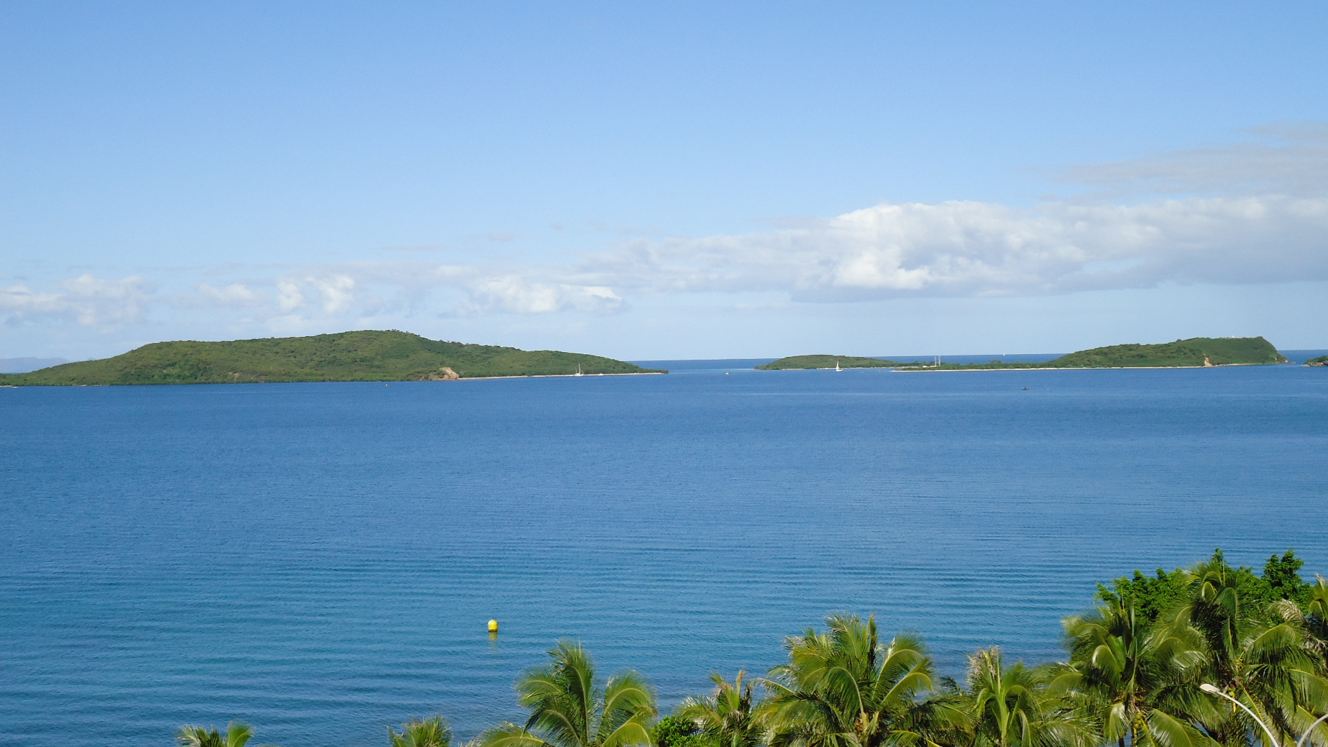 Îlots dans la baie de Saint-Marie à Nouméa